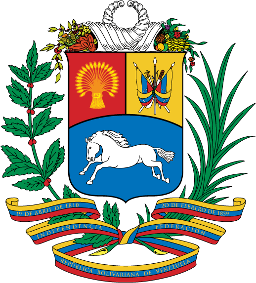 Nel 2006 furono modificati lo stemma del Venezuela e la bandiera. All'Araldista Fabio Cassani Pironti, fu affidato dall'Assemblea Nazionale, il compito di ridisegnare lo stemma. Questo è il risultato